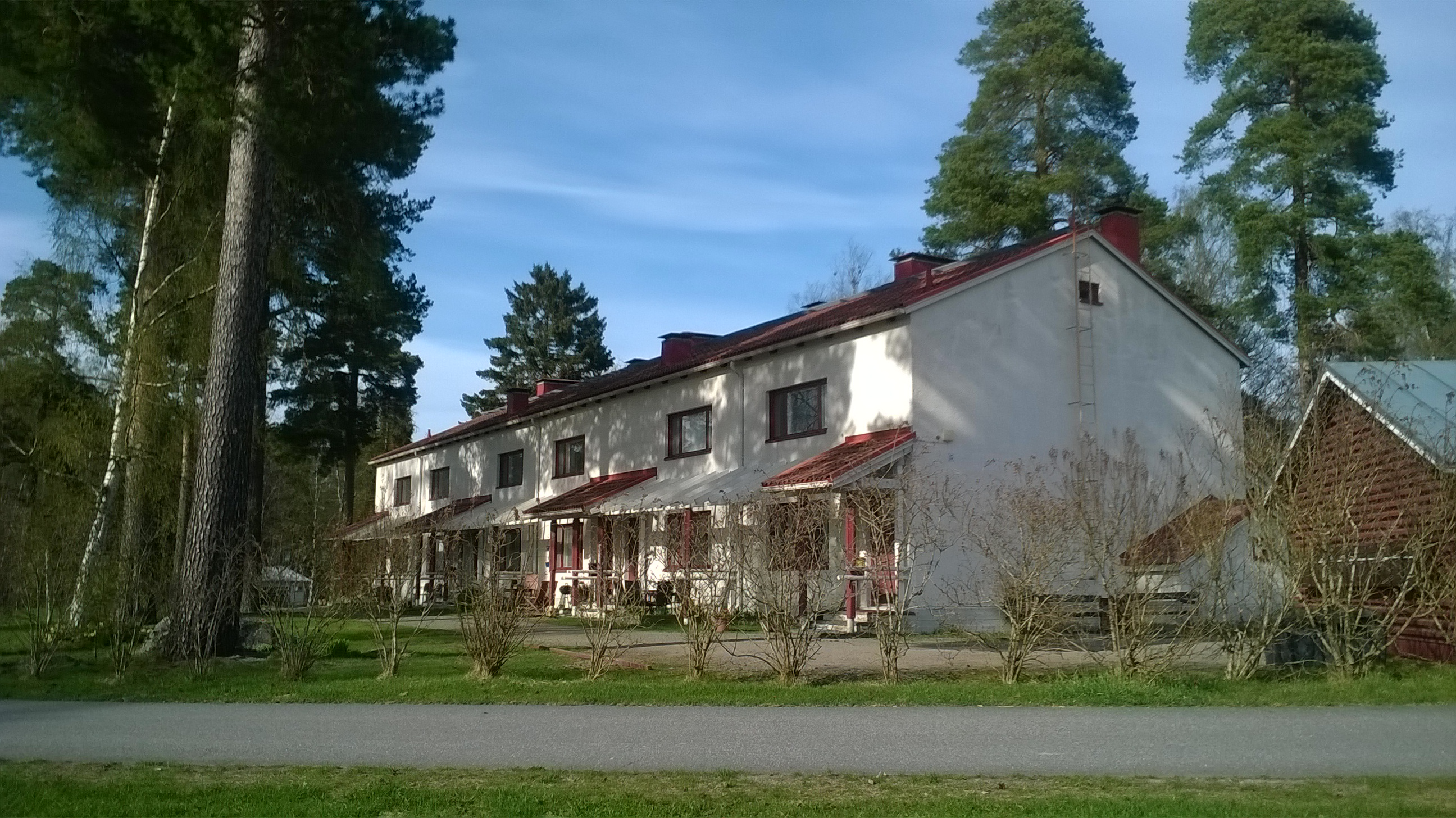 Aaltopuisto; This is a photo of a monument in Finland identified by the ID 'Aaltopuisto' (Q9321305)